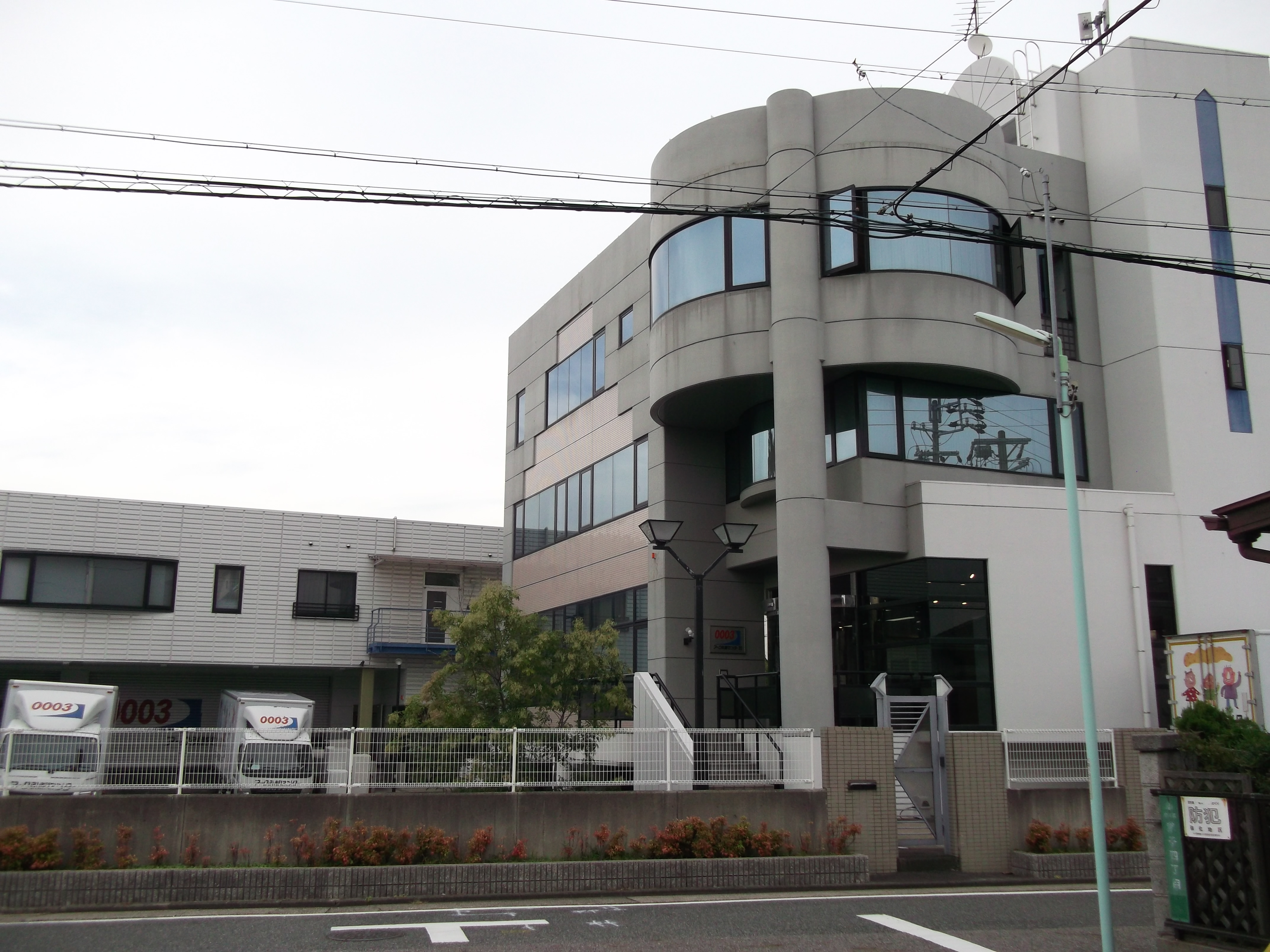 名古屋市中川区のアーク引越センター本社を南側公道より撮影